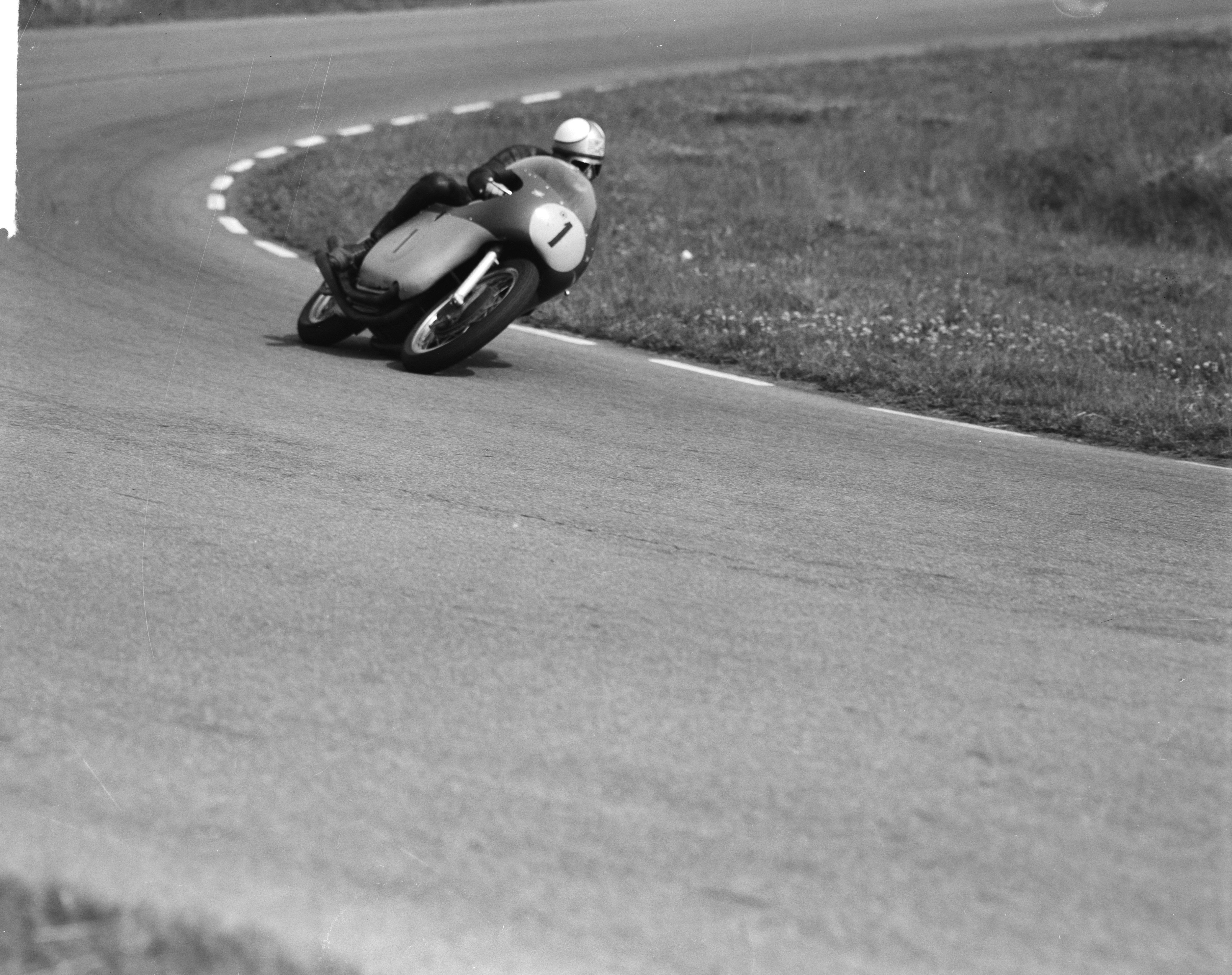 Collectie / Archief : Fotocollectie Anefo Reportage / Serie : TT Assen 1964 Beschrijving : Mike Hailwood op zijn MV Agusta op weg naar de overwinning in de 500cc Datum : 27 juni 1964 Locatie : Assen Trefwoorden : motorsport Persoonsnaam : Hailwood, Mike Fotograaf : Bilsen, Joop van / Anefo, [onbekend] Auteursrechthebbende : Nationaal Archief Materiaalsoort : Negatief (zwart/wit) Nummer archiefinventaris : bekijk toegang 2.24.01.04 Bestanddeelnummer : 916-5931